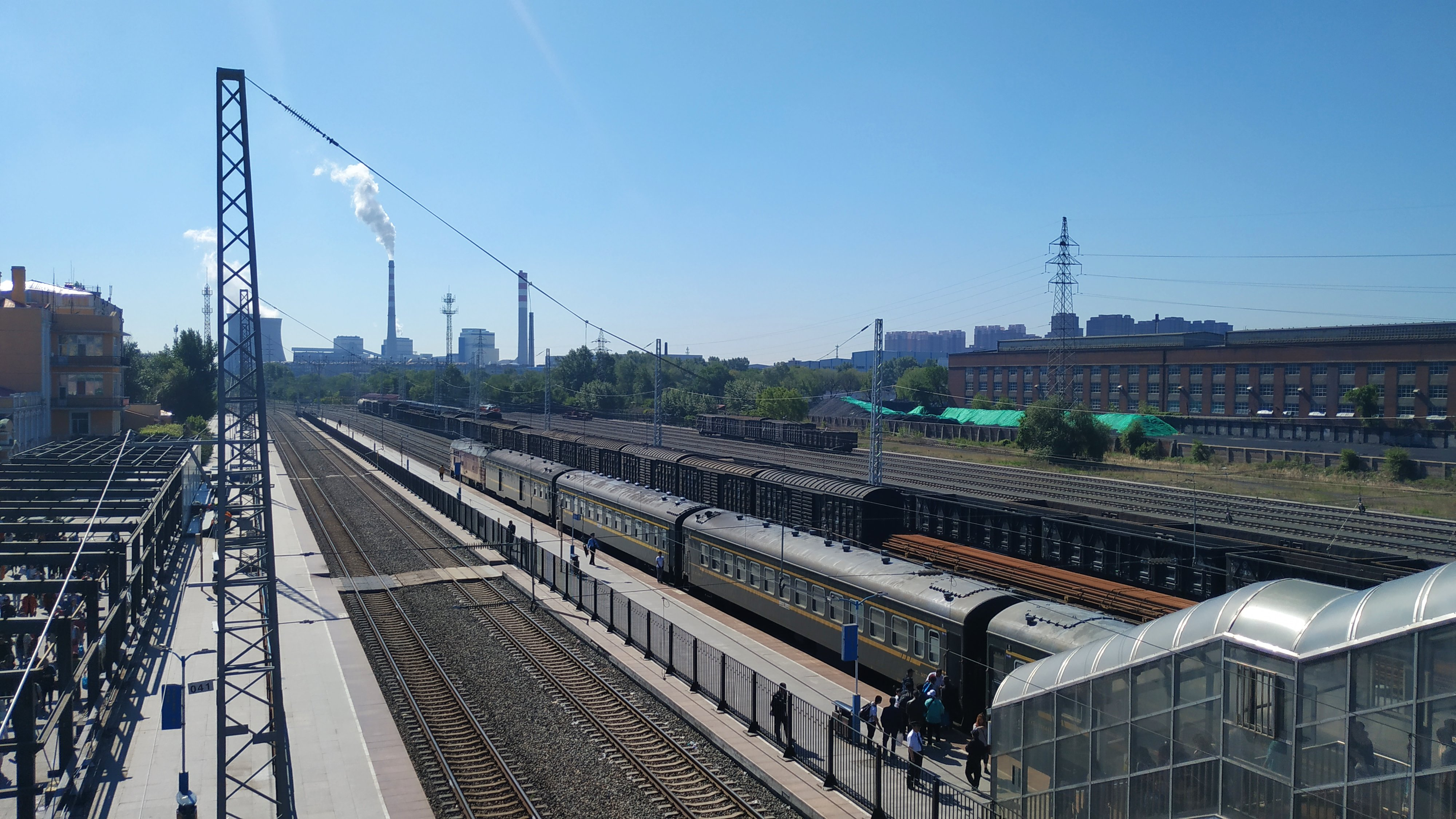 中文（中国大陆）: 香坊站自天桥西向望